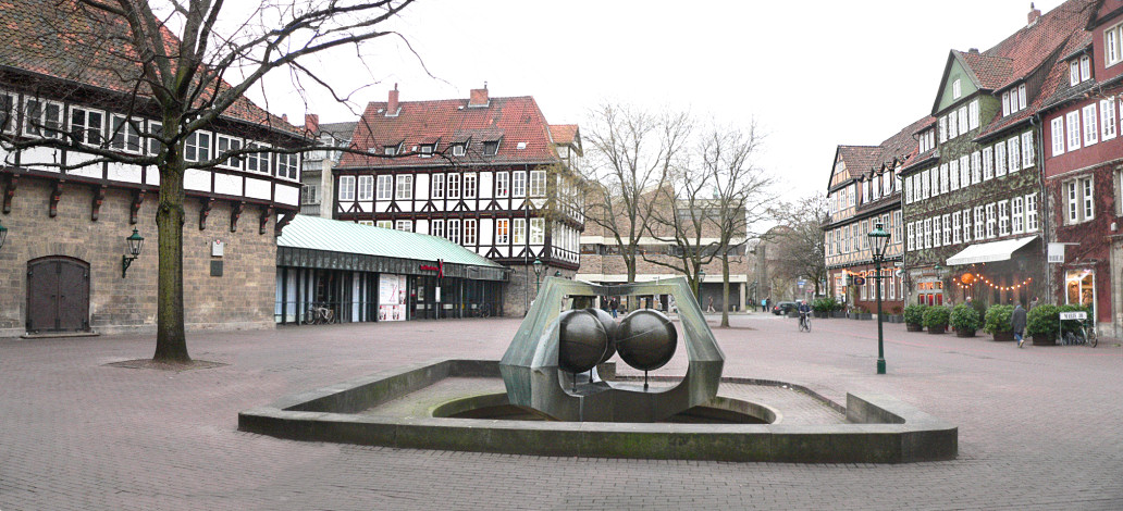 Ballhofplatz Hannover